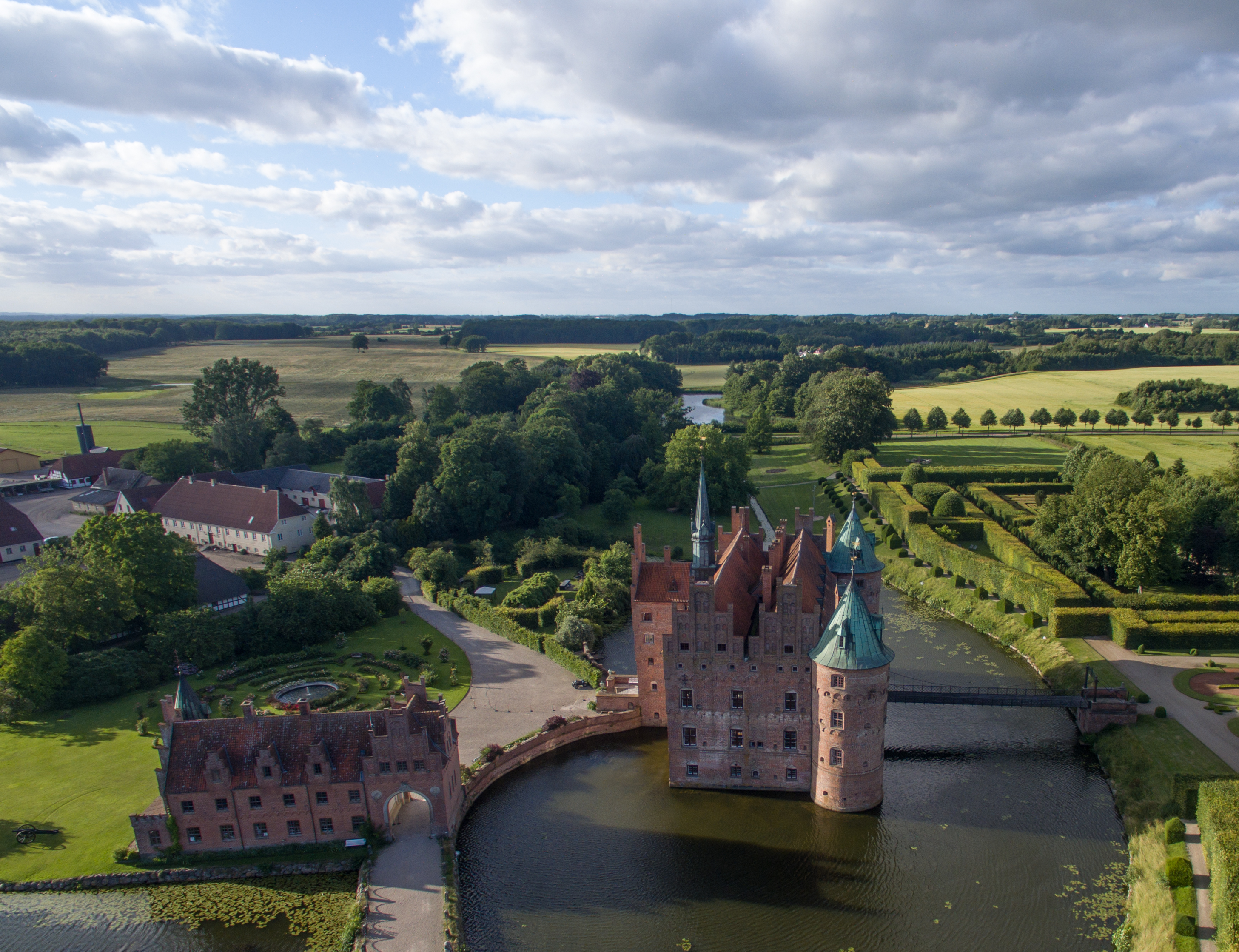 Egeskov Castle